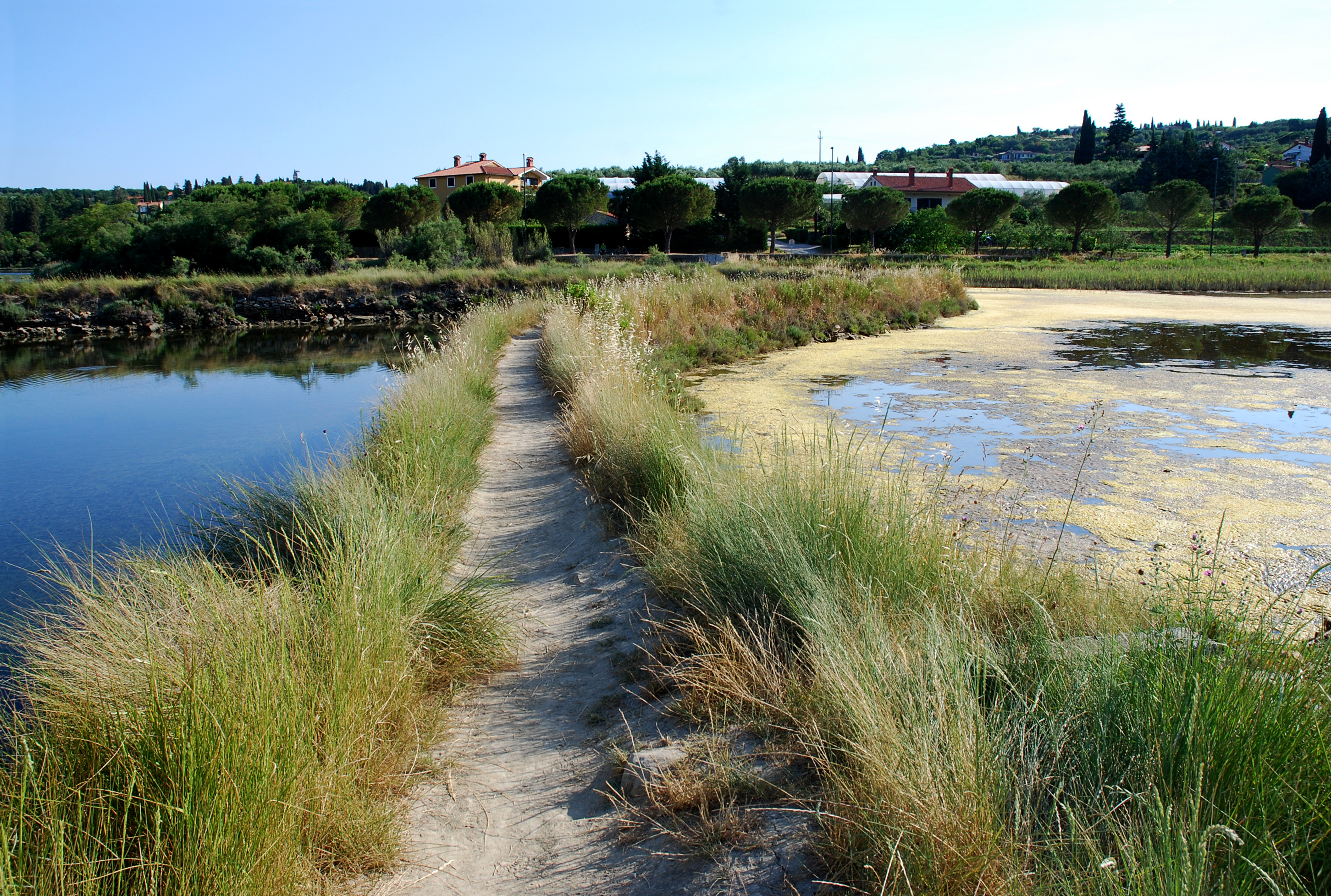 V přírodní rezervaci Strunjan